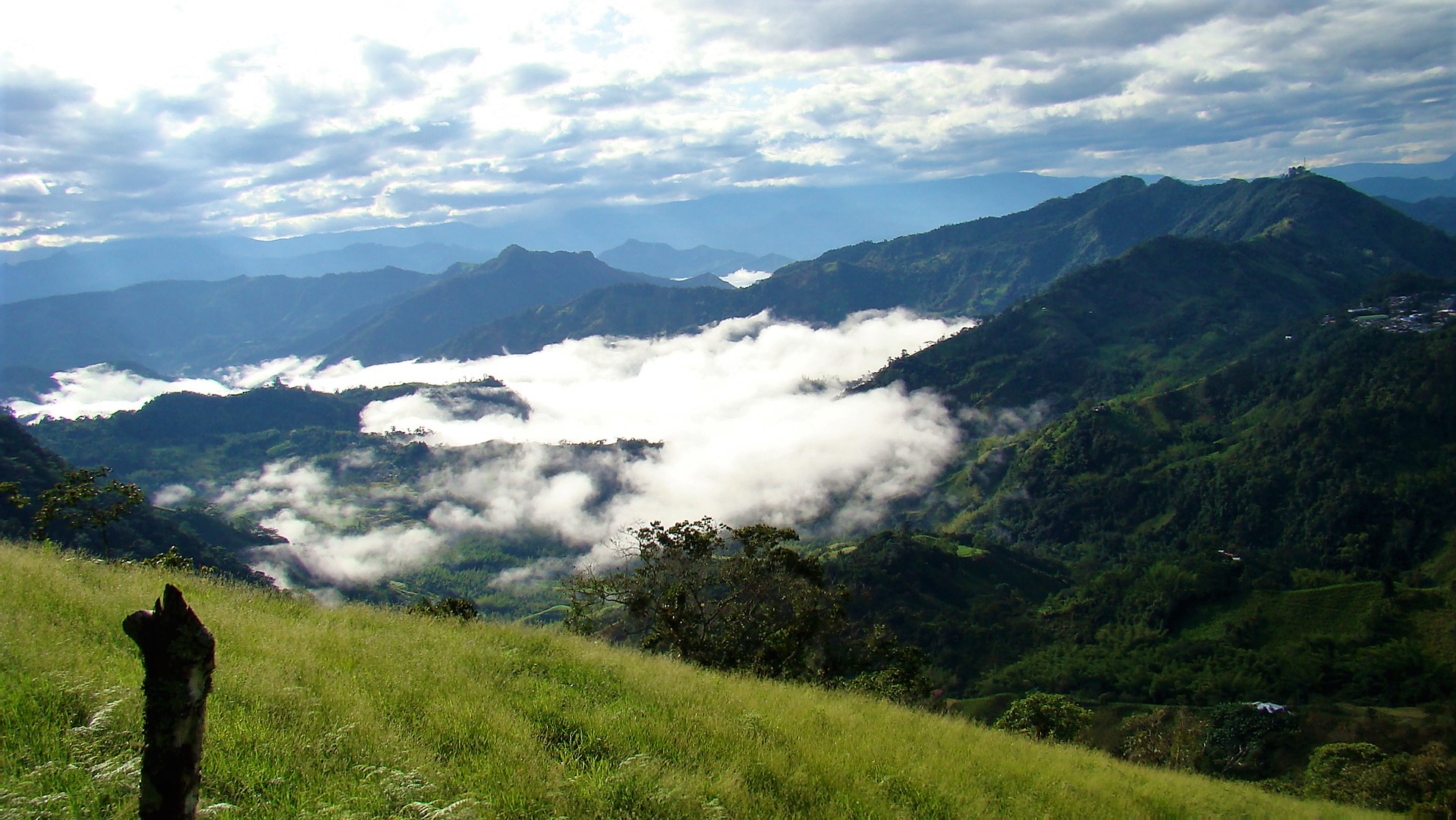 En el paisaje palmero se destacan las prominentes montañas de la cordillera oriental, gran parte de su territorio se dedica a la producción agrícola y ganadera y algunas de sus cumbres y zonas bajas guardan porciones de Bosque de niebla característico en la región del Rionegro